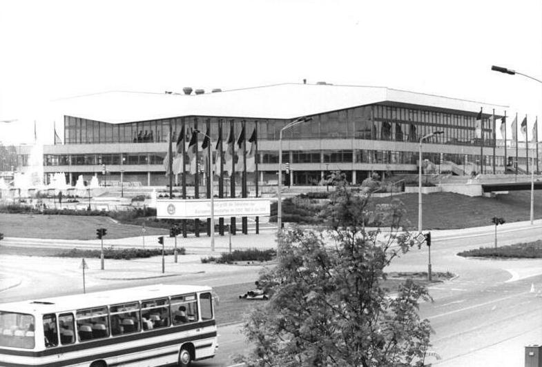 Rostock, Sport- und Kongresshalle ADN-ZB Sindermann 13.5.82 Rostock: Blick auf die Rostocker Sport- und Kongreßhalle, Austragungsstätte der Judo-Europameisterschaften vom 13. bis 16.5.1982